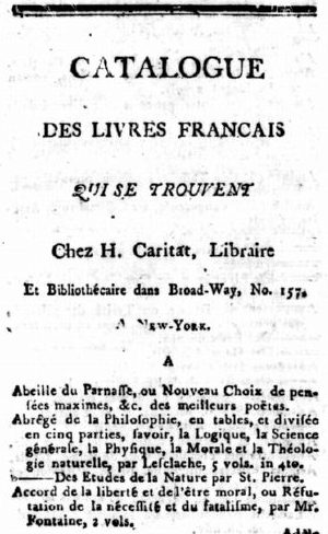 From: Catalogue des livres francais qui se trouvent chez H. Caritat, libraire et bibliothécaire dans Broad-Way, no. 157. 1799